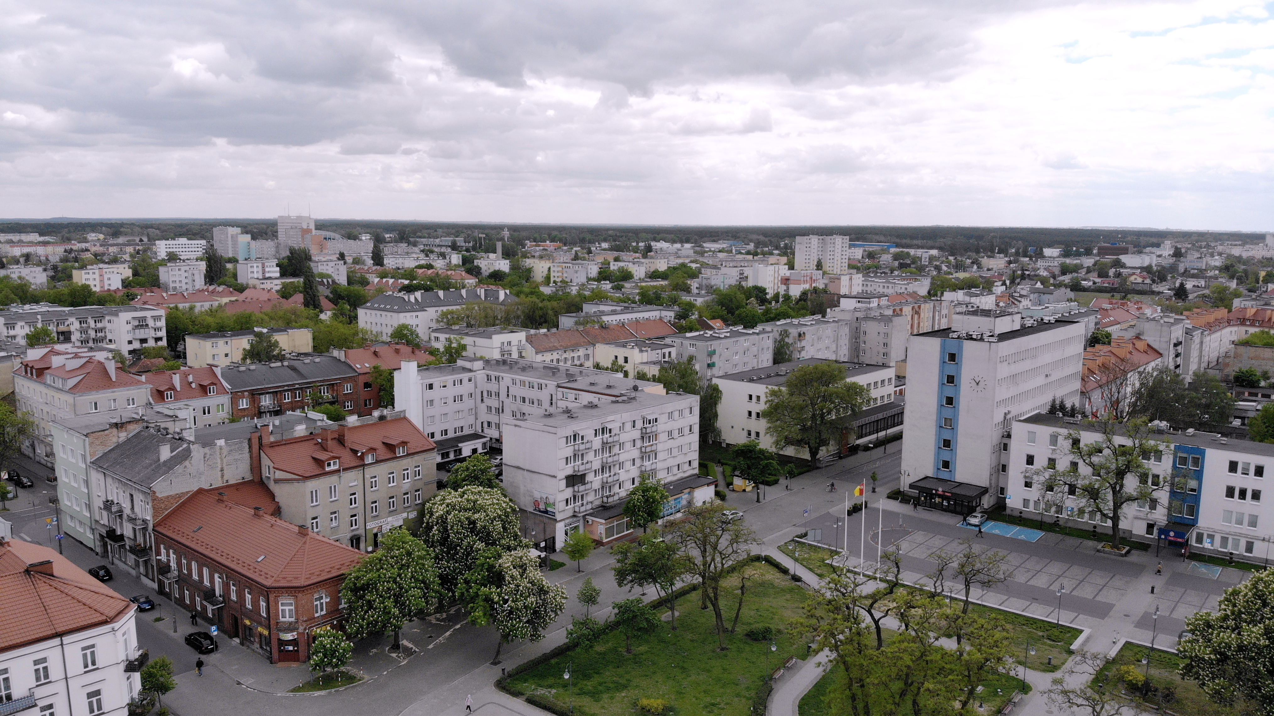 Śródmieście (2020 r.)